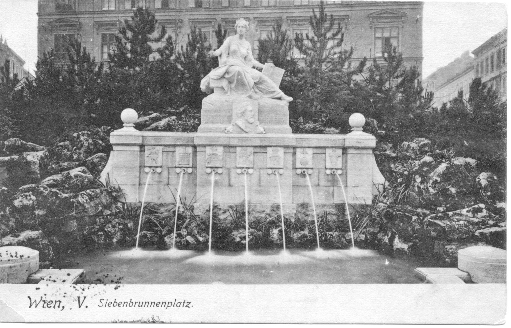 Siebenbrunnen am Siebenbrunnenplatz in einer alten Aufnahme